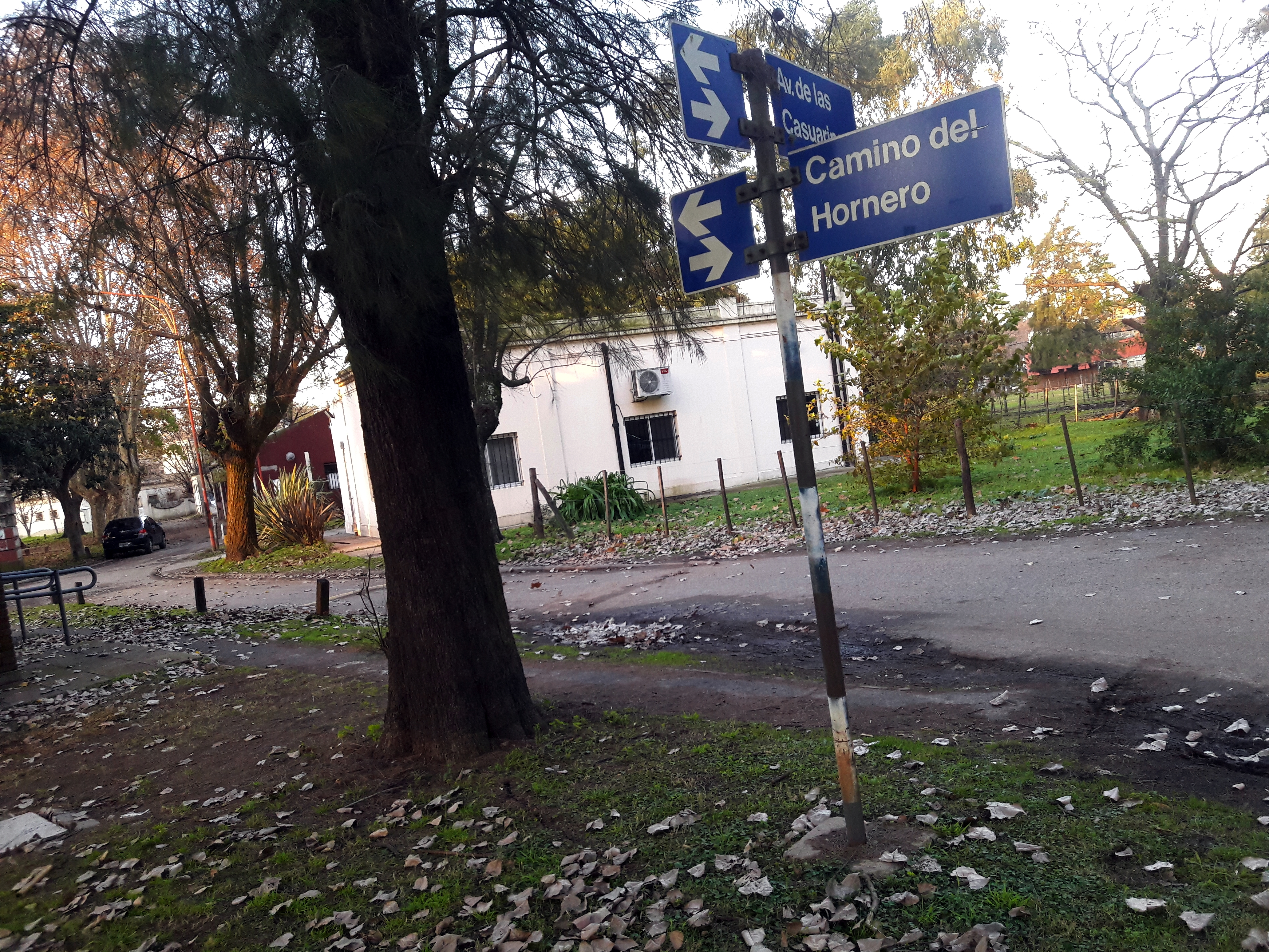 En una tarde otoñal